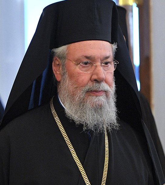 Архиепископ Новой Юстинианы и всего Кипра Хризостом перед началом встречи с представителями поместных православных церквей.